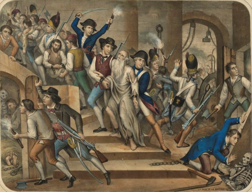 Estampe de la Prise de la Bastille le 14 juillet 1789. Par H. Jannin, Musée de la Révolution française, Vizille.